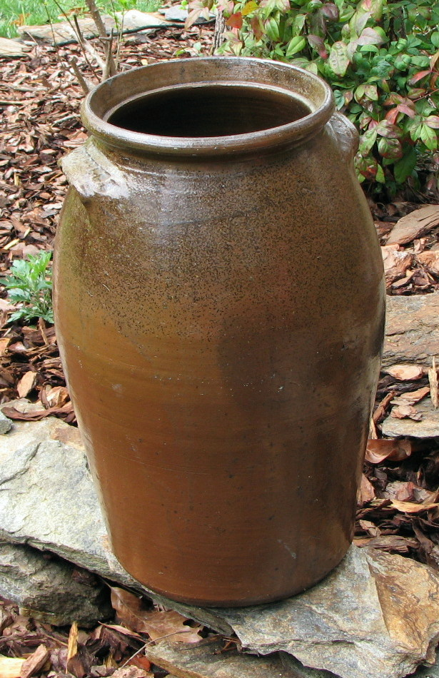 Catawba Valley 4 gallon jar